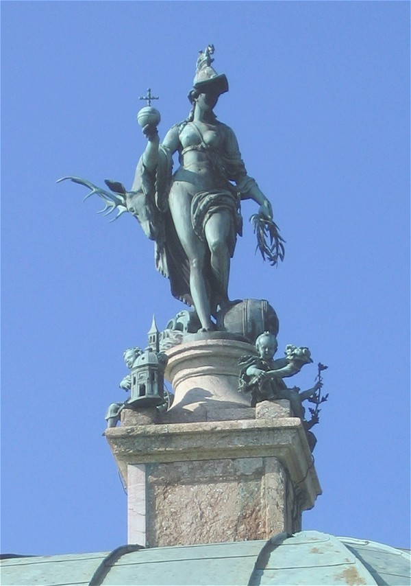 „Tellus Bavarica“ auf dem Dianatempel im Hofgarten, Muenchen. (Die Kuppel des zentralen „Dianatempels“ im Hofgarten wurde ursprünglich von einer bronzenen Statue der Diana von Hubert Gerhard gekrönt, welche Hans Krumpper 1623 zur Allegorie Bayerns umgestaltete, indem er sie unter anderem mit Attributen ausstattete, die den natürlichen Reichtum des Landes symbolisieren sollen. Diese sind Salzfass, Hirschfell, Reuse, Ährengarbe und Kurapfel.)